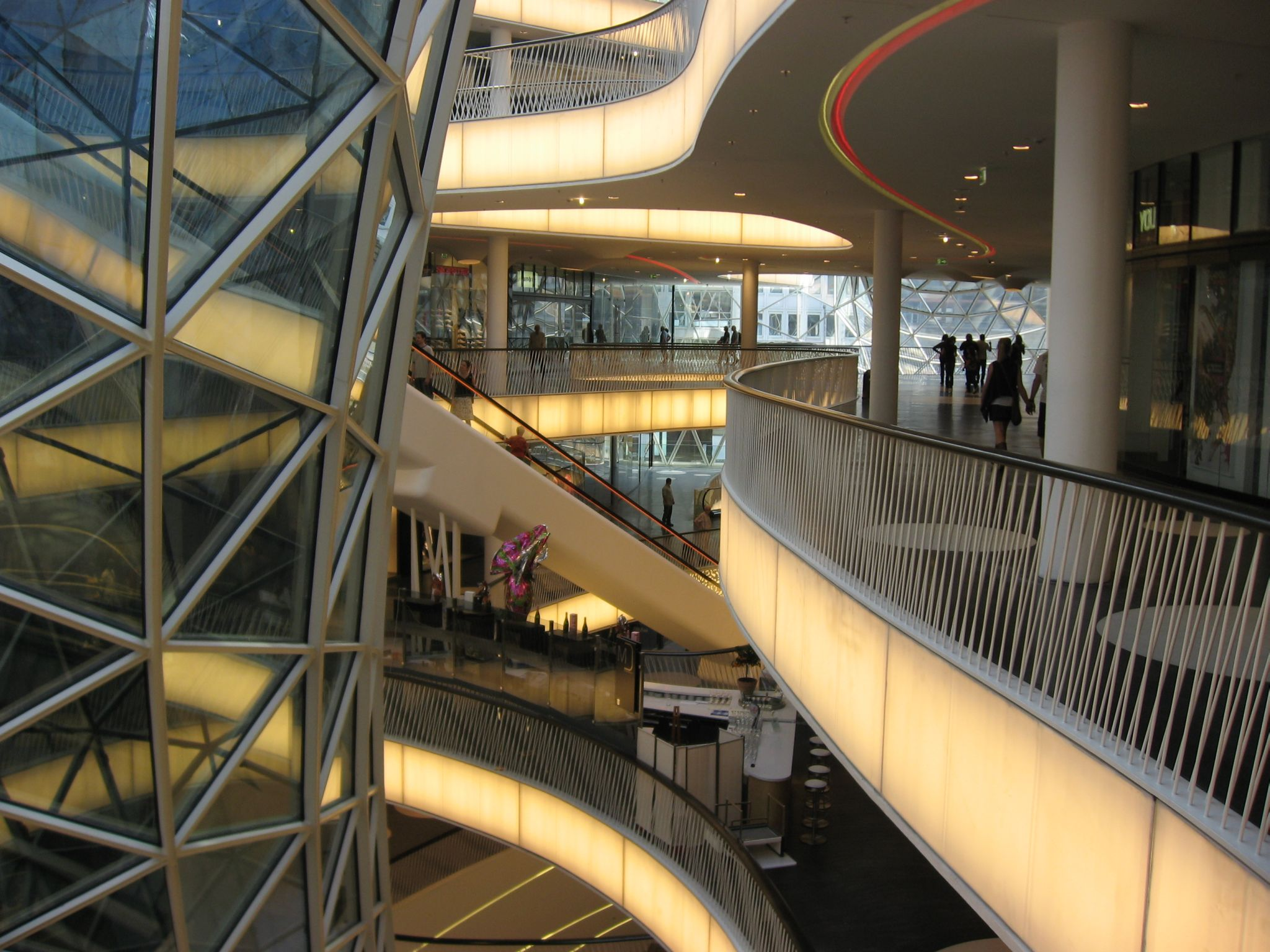 MyZeil, 2.OG